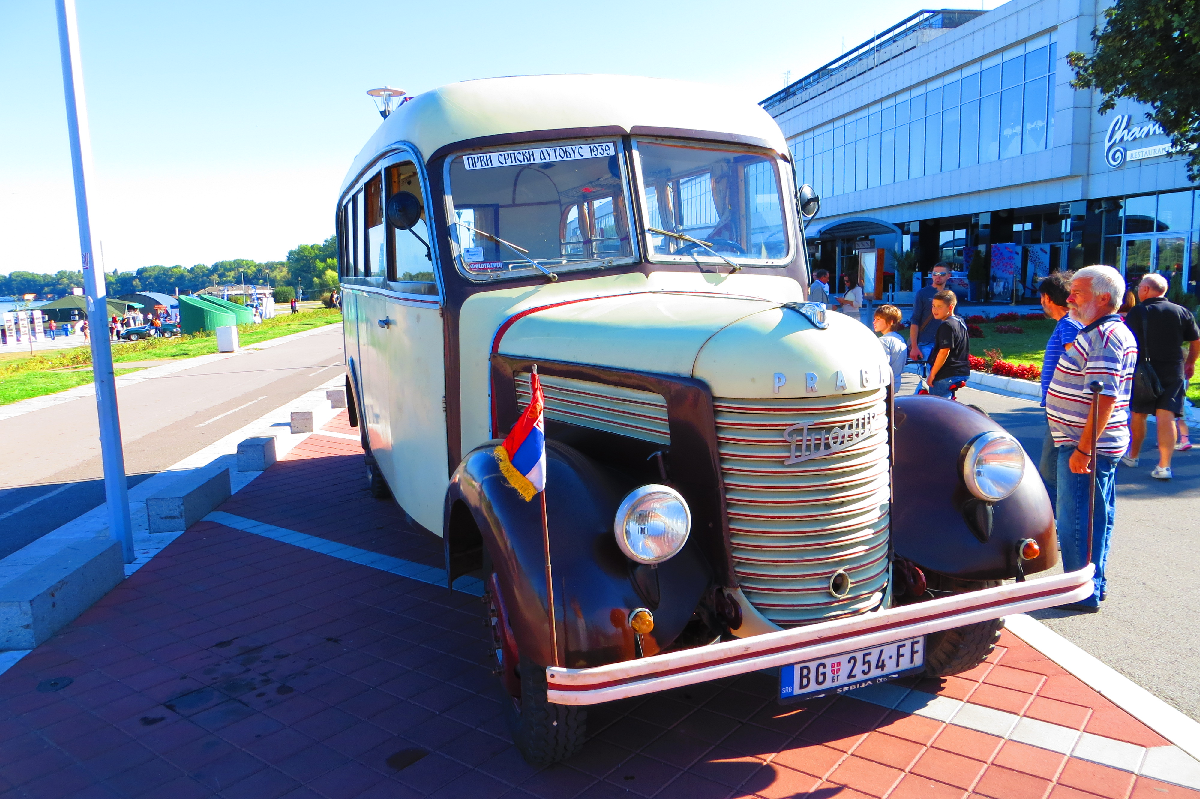 Izložba Oldtajmera